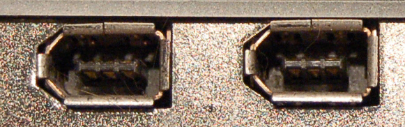 Firewire port